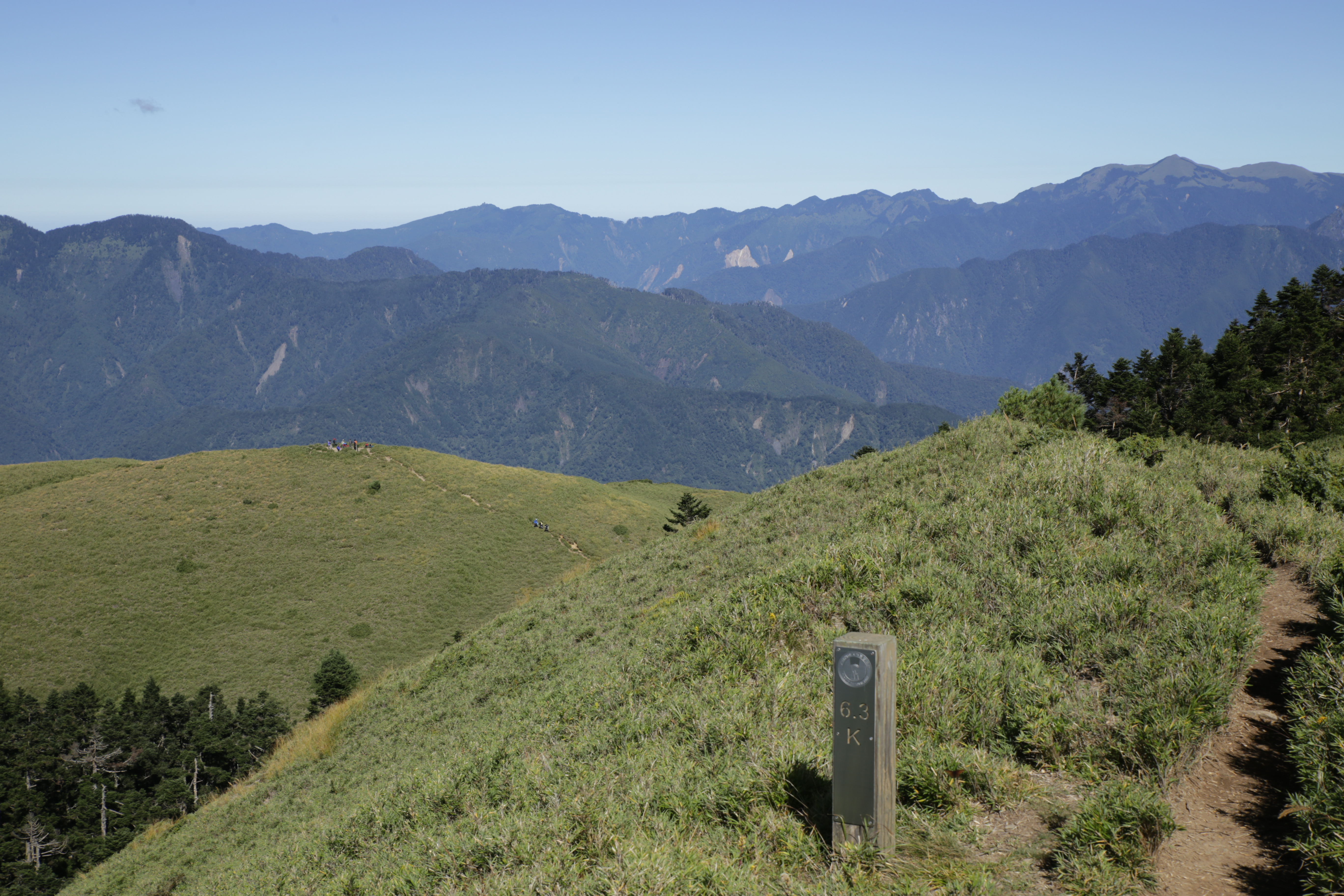 合歡西峰